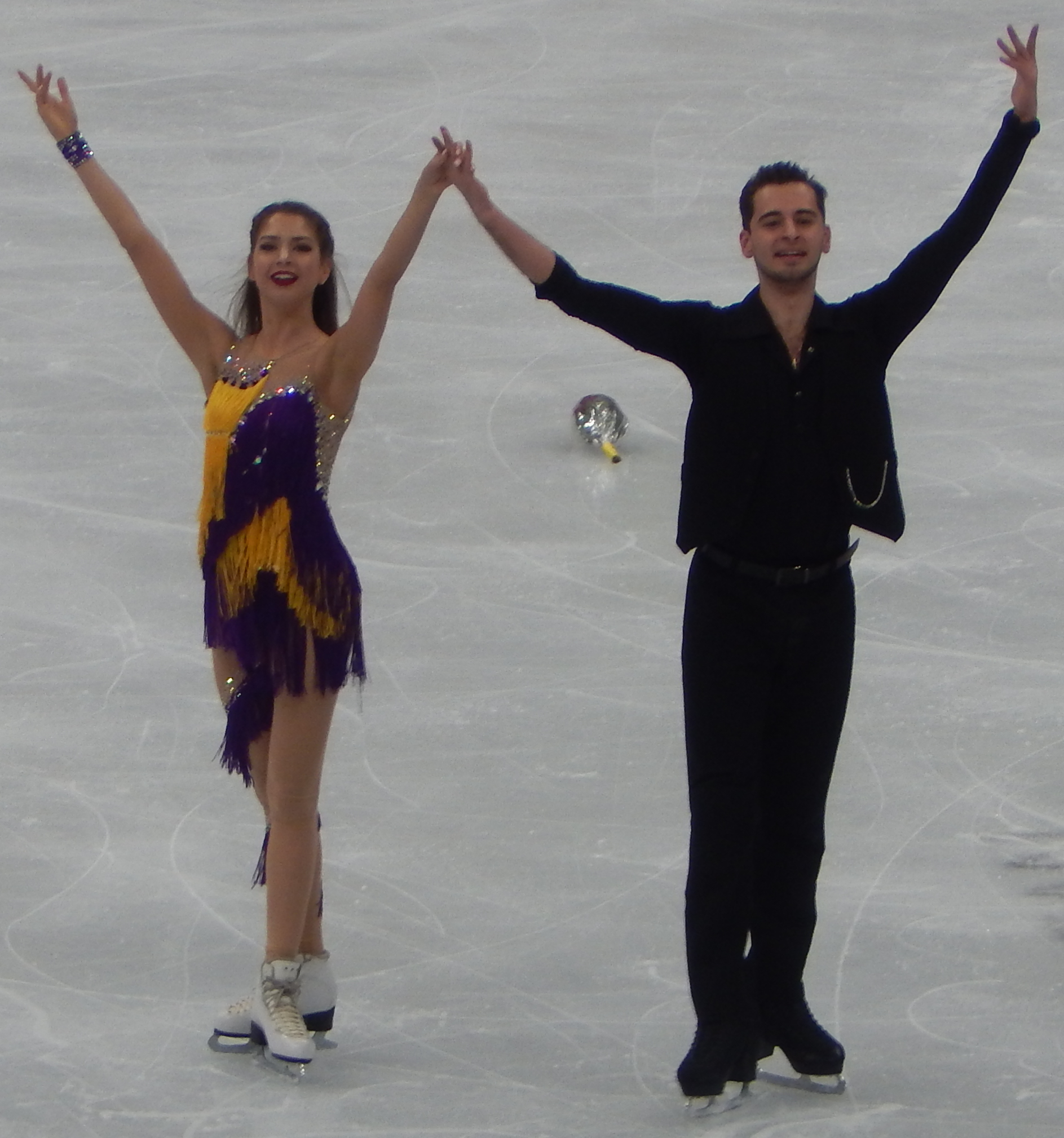 Чемпионат Европы по фигурному катанию 2018 в Москве. Третий день соревнований (19 января). Танцевальная пара из Украины Александра Назарова и Максим Никитин